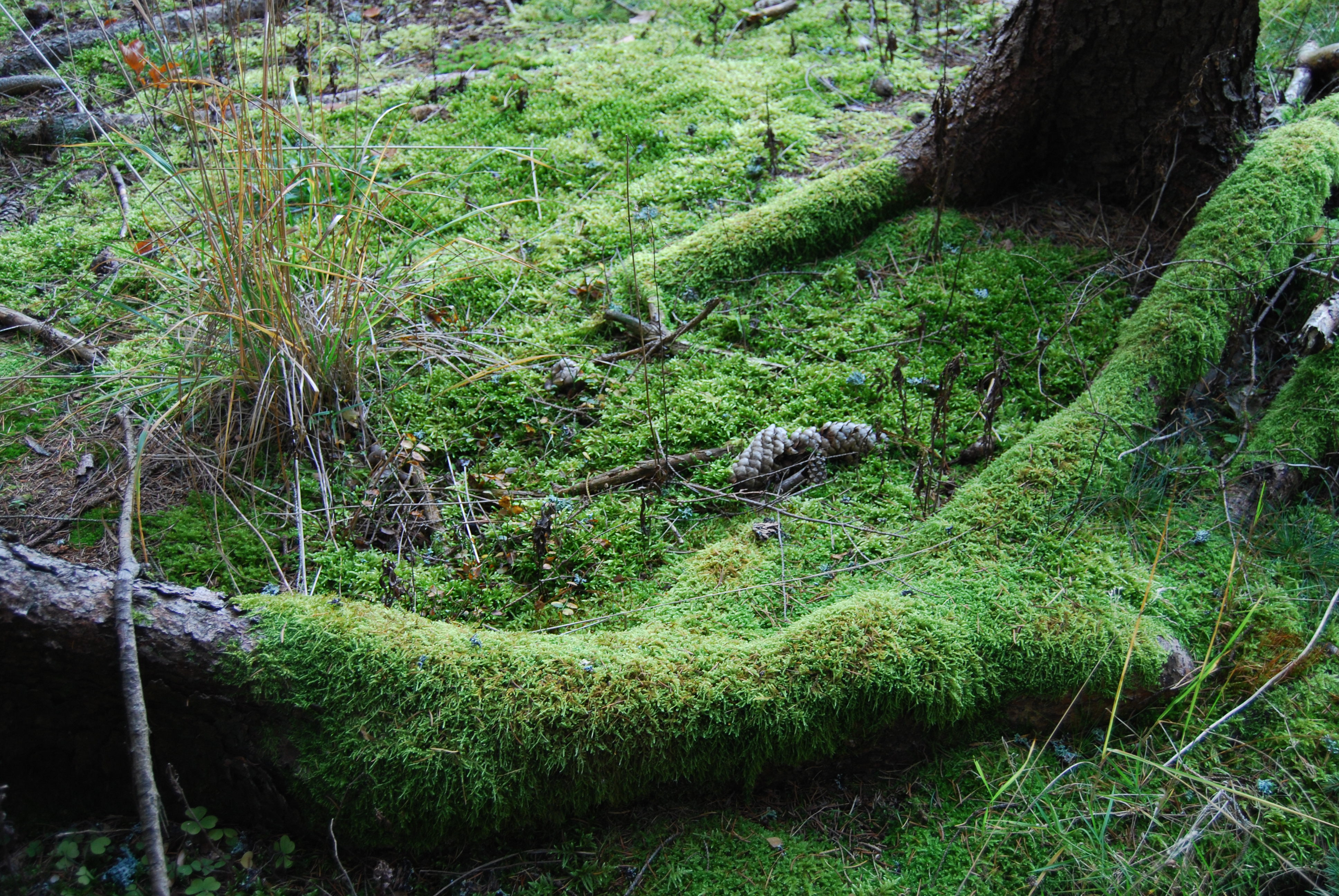 Přírodní rezervace Výří skály u Oslova, nedaleko obce Tukleky. Okres Písek. Česko.